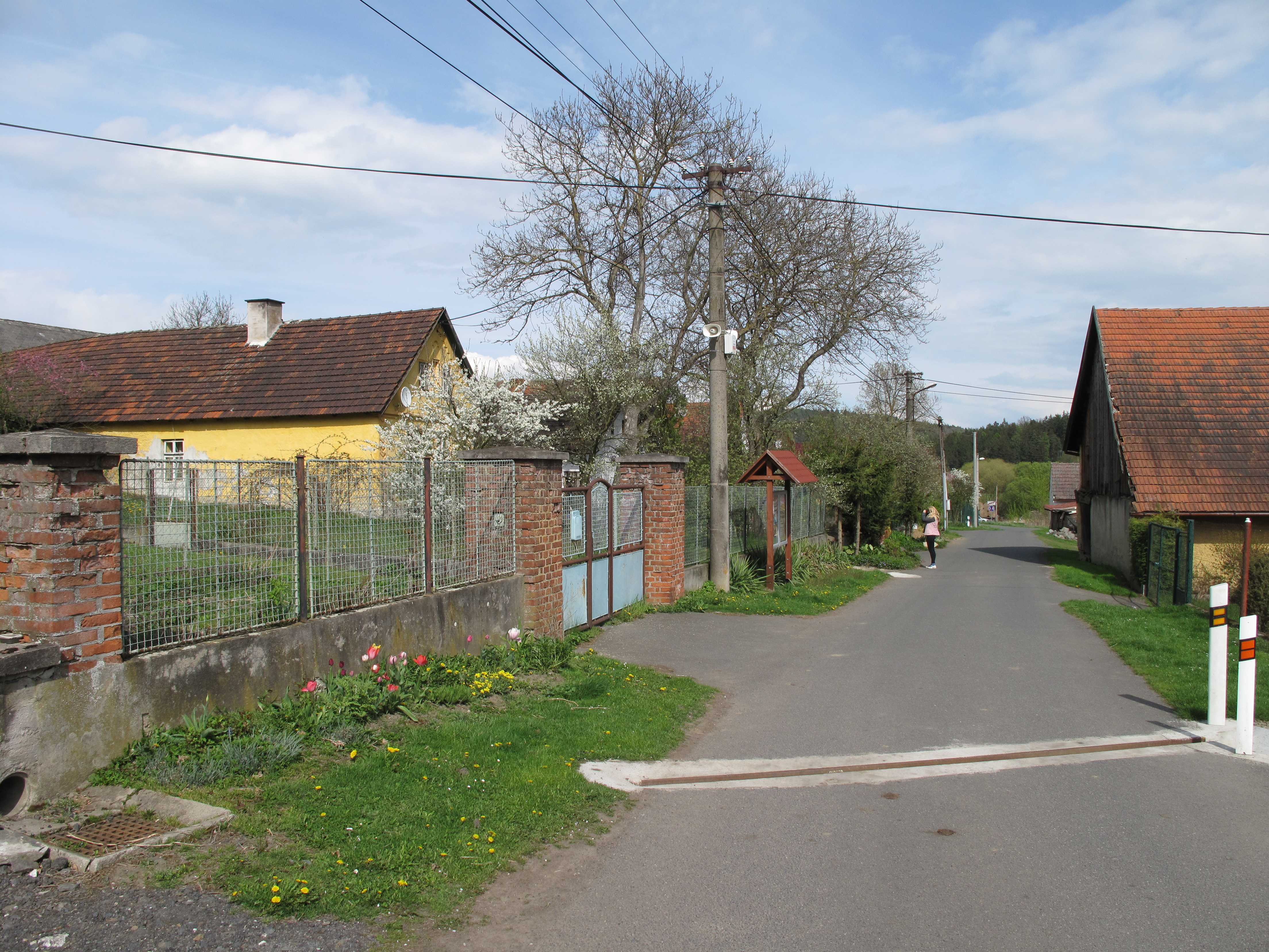 Andělice. Okres Klatovy, Česká republika.